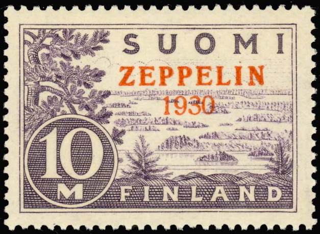 Первая авиапочтовая марка Финляндии, 1930